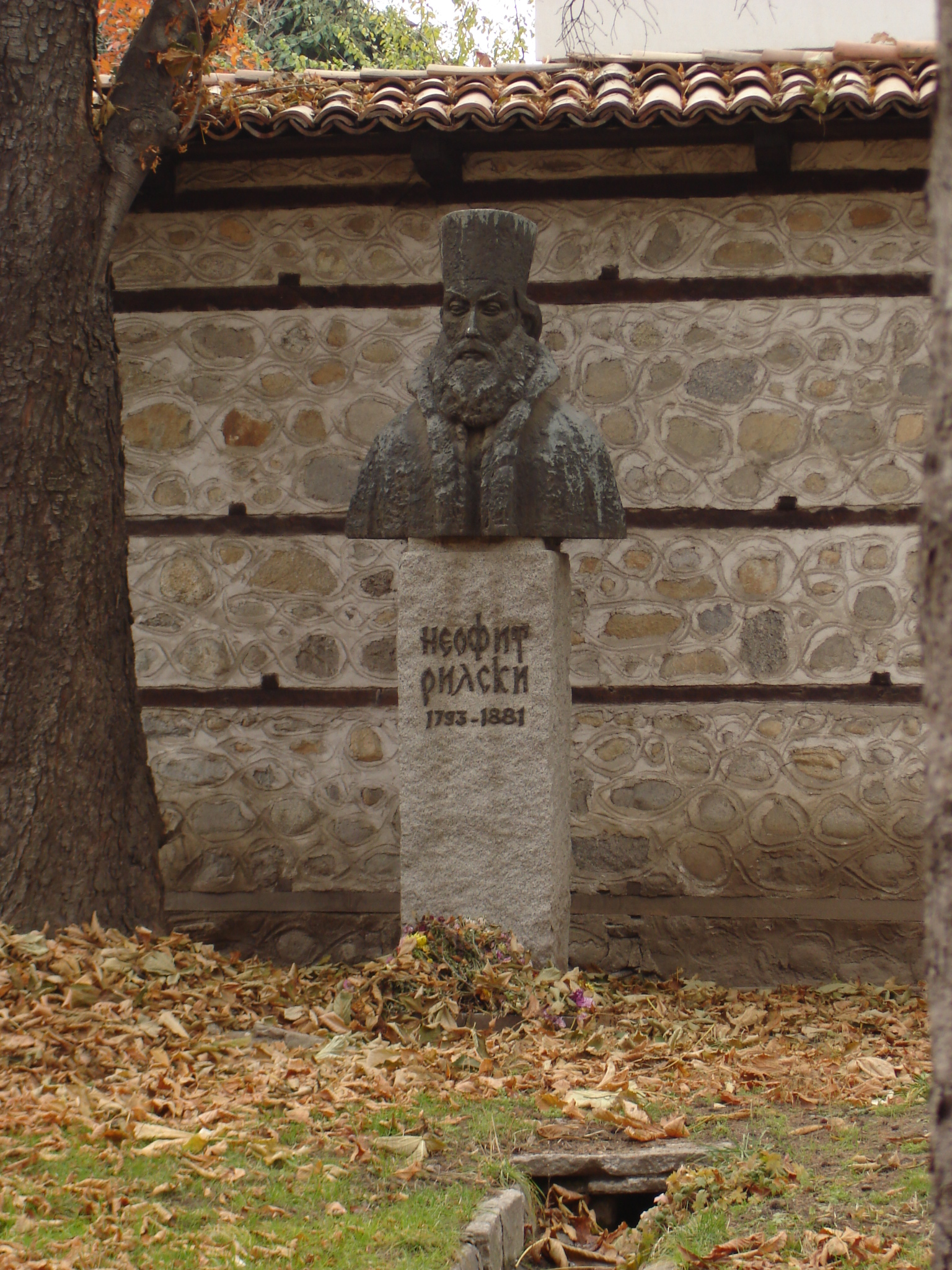 Паметник на Неофит Рилски